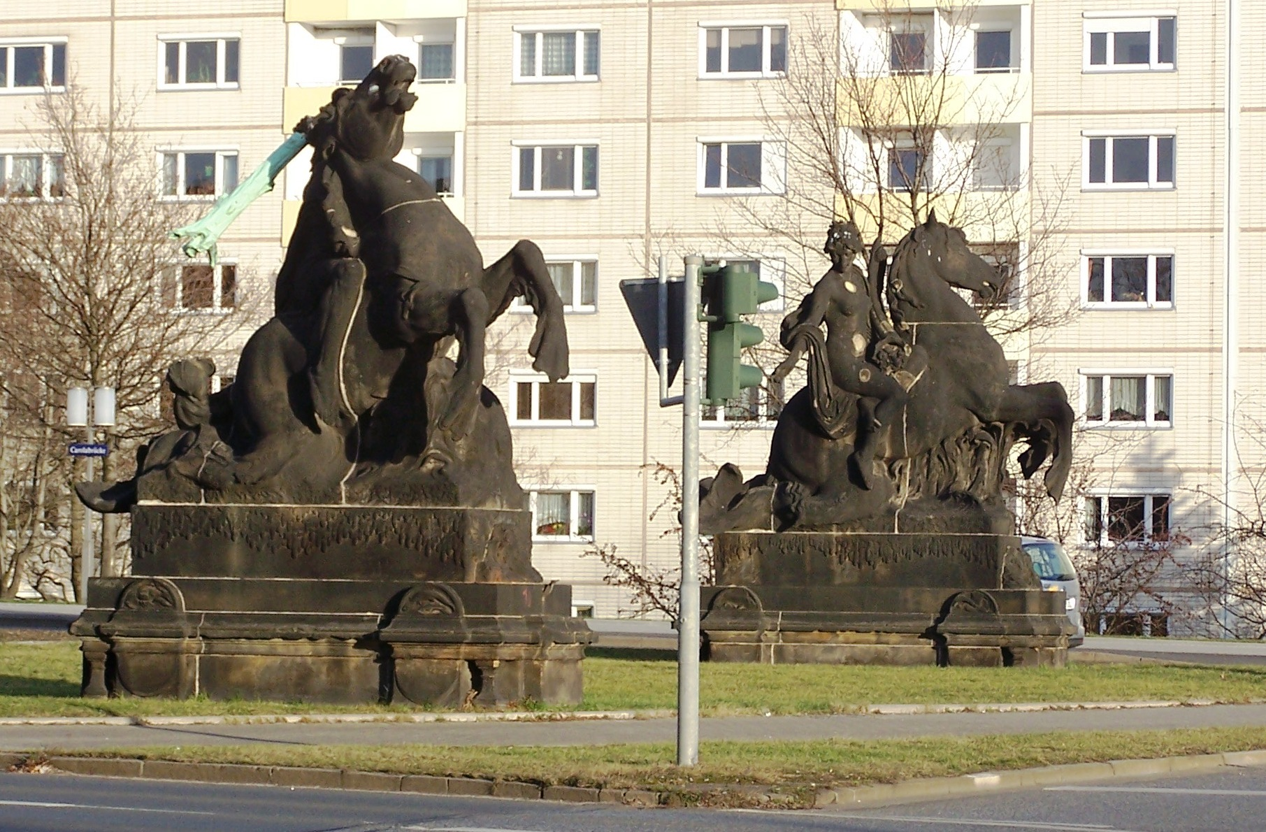 allegorische Skulpturen der alten Carolabrücke in Dresden, 1907 von Bildhauer Friedrich Offermann (vorne die "bewegte Elbe" und hinten die "ruhige Elbe")